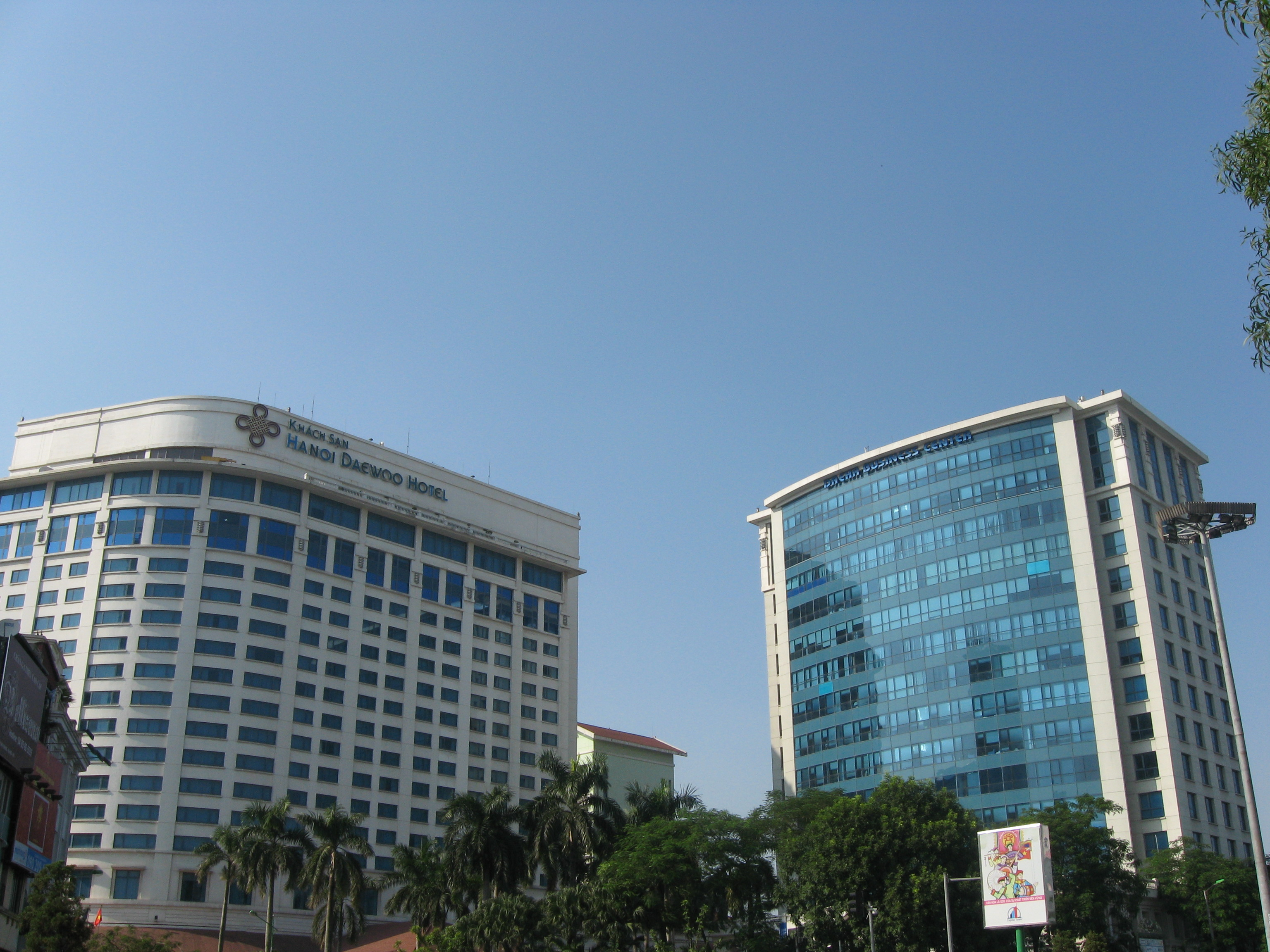 Hanoi Daewoo Hotel